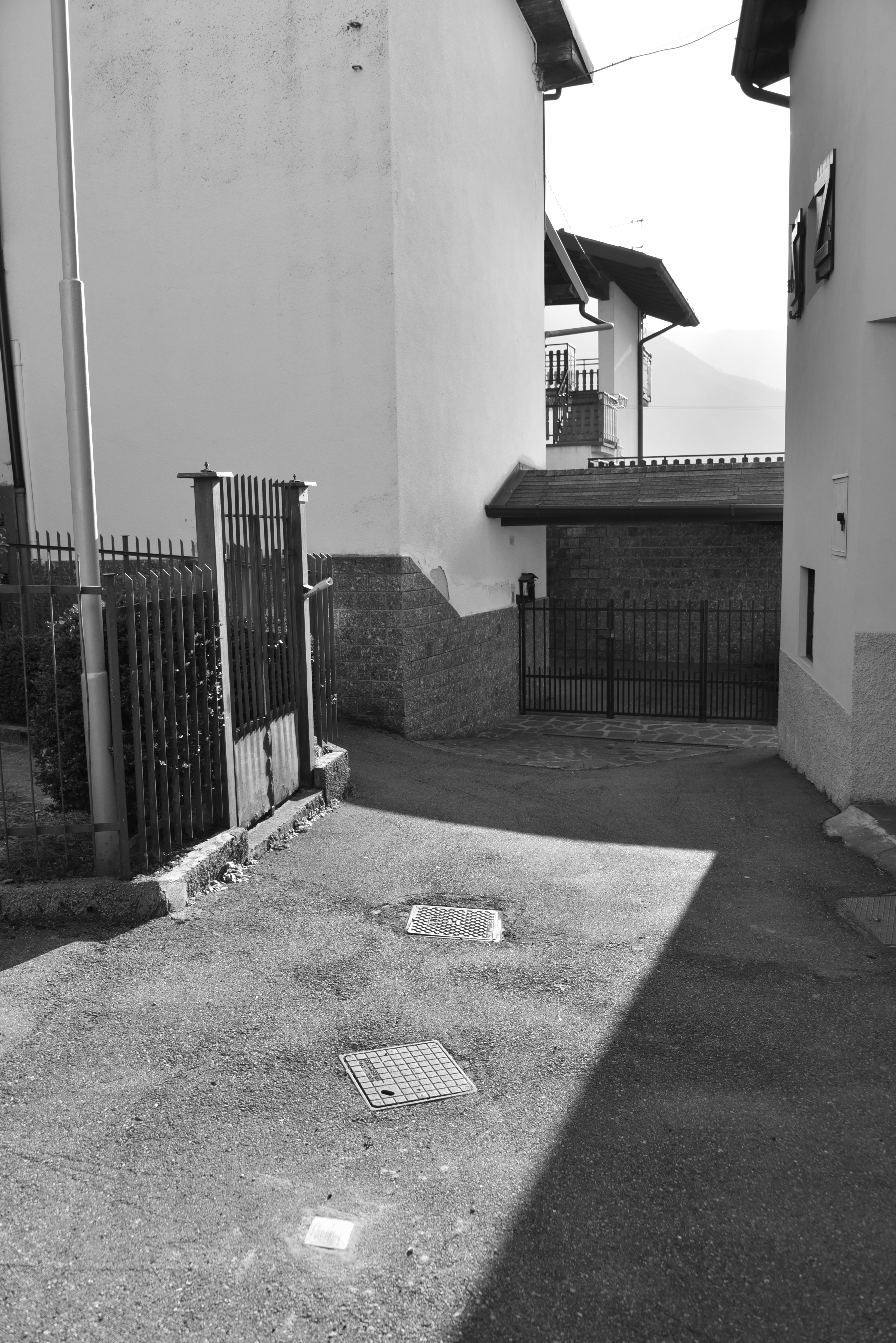 Stolperstein in Premolo